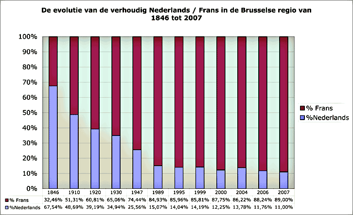 Evolutie van de verhouding Nederlands versus Frans in de Brusselse regio van 1846 tot 2007. Statistiek gebaseerd op : 1) de officiële talentellingen van 1846, 1910, 1920 en 1947 2) de resultaten van de gewestelijke verkiezingen van 1989, 1994, 1999 en 2004 3) het aantal Nederlandstalige en Franstalige verkozenen naar aanleiding van de gemeenteraadsverkiezingen van 2000 en 2006 4) het resultaat van de Nederlandstalige en Franstalige lijsten naar aanleiding van de nationale verkiezingen van 2007.